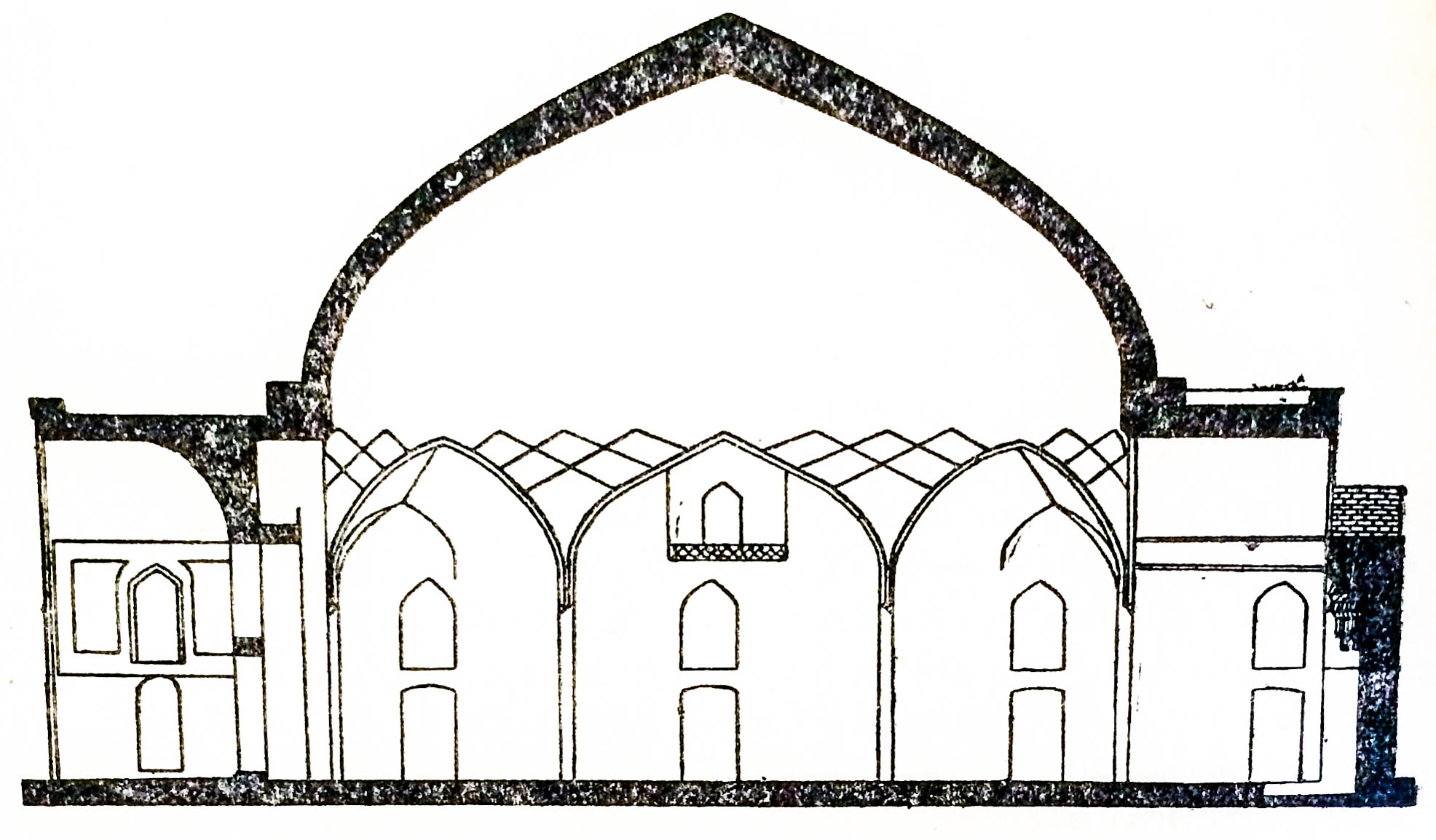 Gəncə Şah Abbas məscinin profil kəsimi